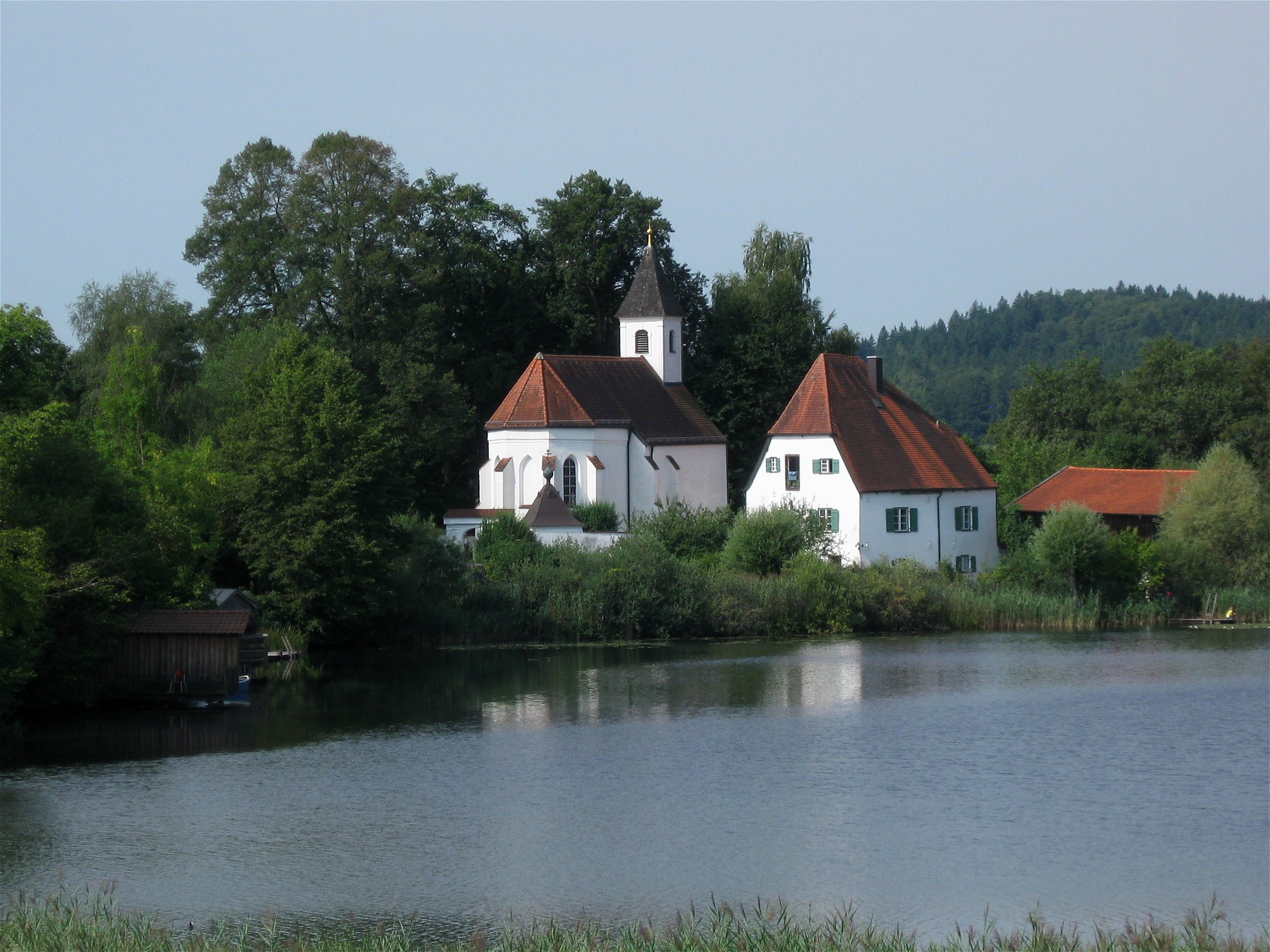 Klosterweg 12; Kirche St. Walburgis, einschiffiger gotischer Bau, 14./15. Jahrhundert, über Grundmauern der Kirche des ehemaligen Nonnenklosters, seit 1481 Pfarrkirche; mit Ausstattung; Kirchhofummauerung, wohl 16./17. Jahrhundert; im Friedhof Begräbnisstätten der Familie von Leuchtenberg, letztes Viertel 19. und erstes Viertel 20 Jahrhundert. Klosterweg 10; Apothekerhaus, zweigeschossiger Massivbau mit Halbwalmdach, spätmittelalterlich.